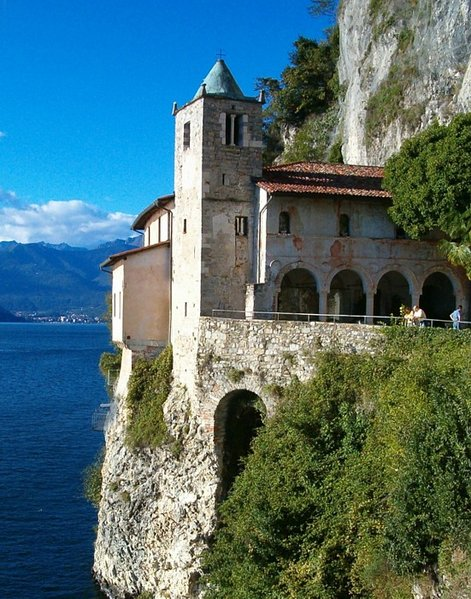 Santa Caterina del Sasso, Lago Maggiore Picture taken by user:Idéfix, august 2004